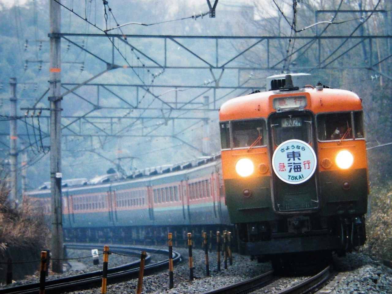 急行東海最終日に取り付けられたヘッドマーク